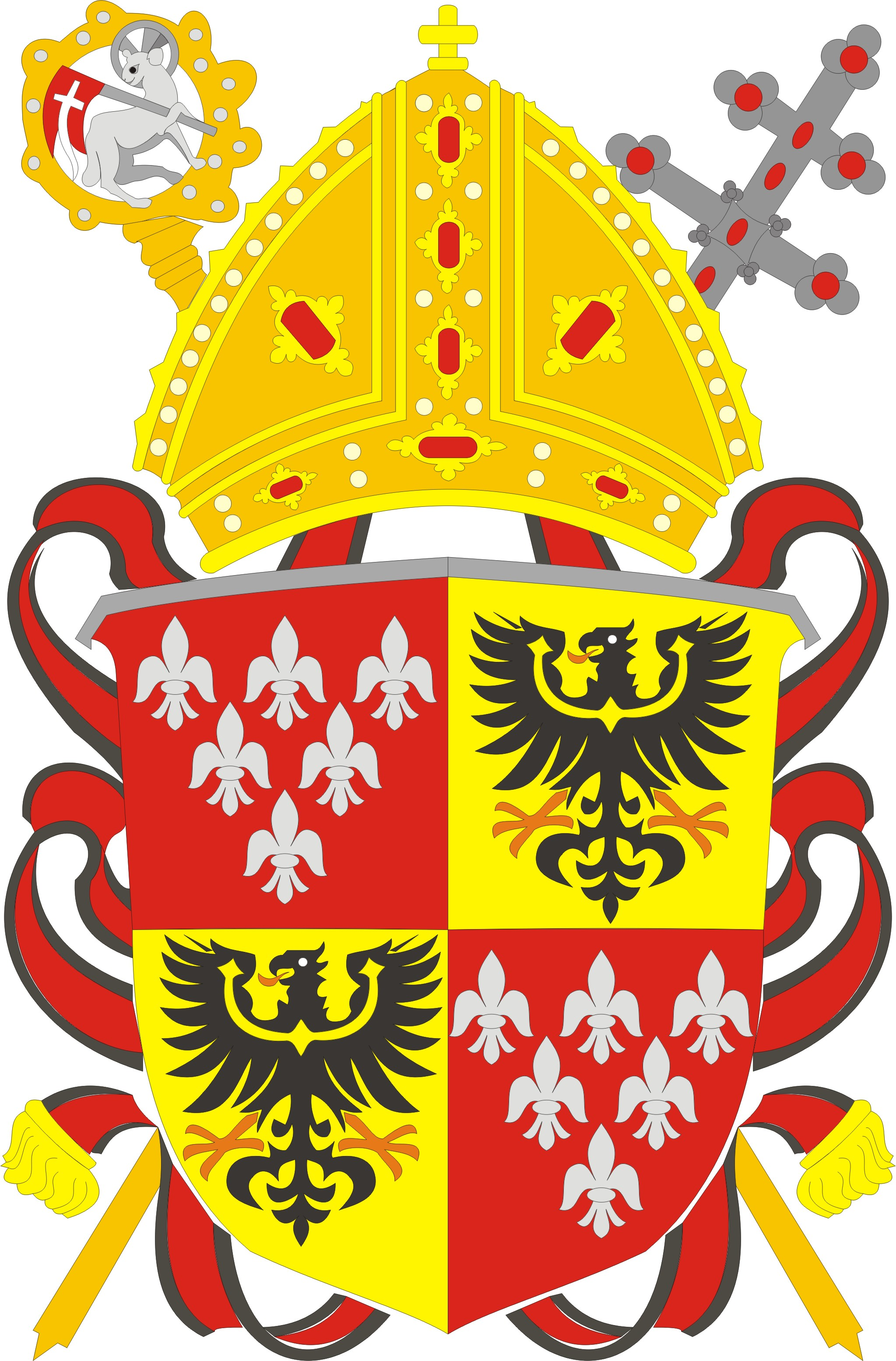 Herb Archidiecezji Wrocławskiej